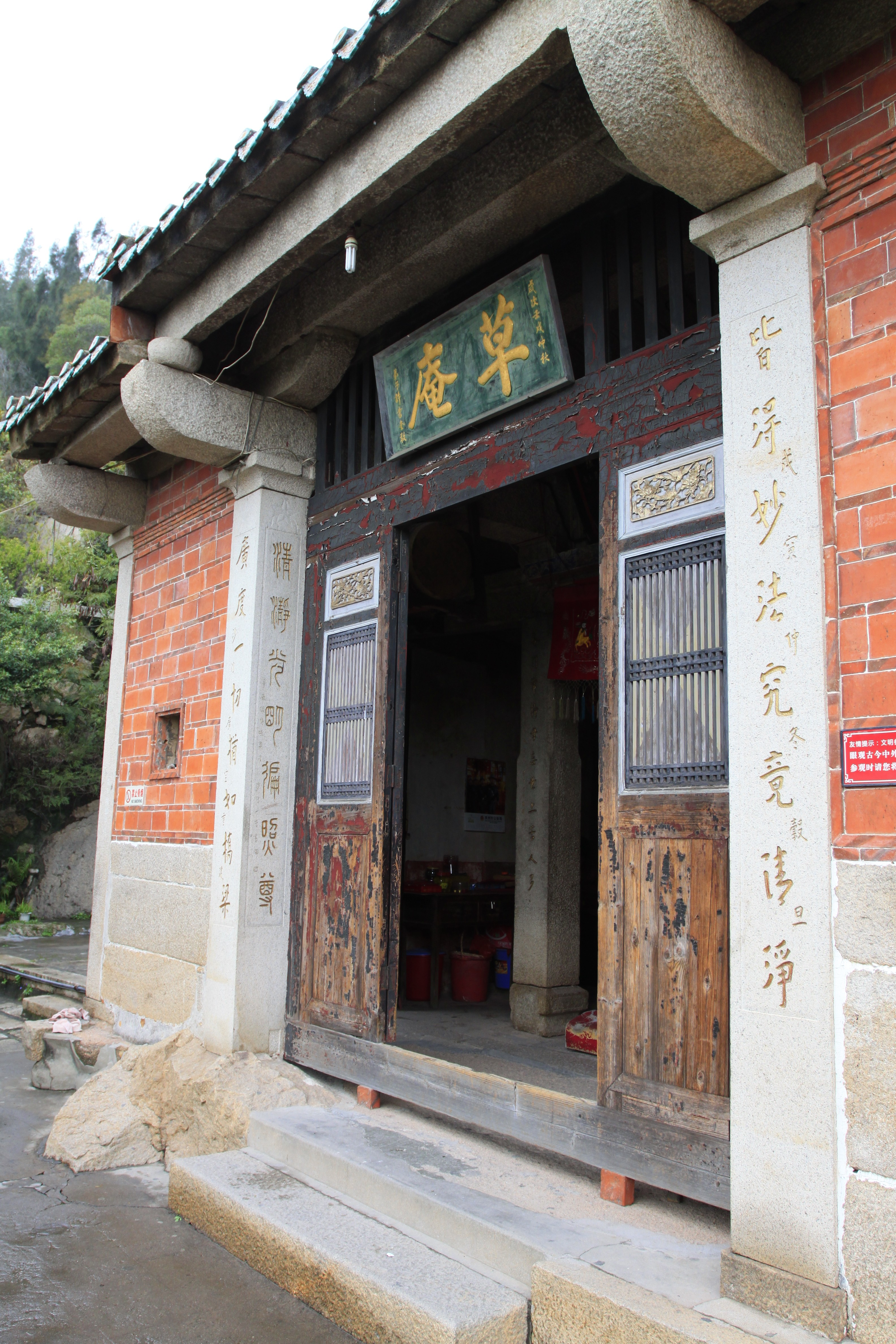 草庵，位于中国福建省晋江市，是全国重点文物保护单位。